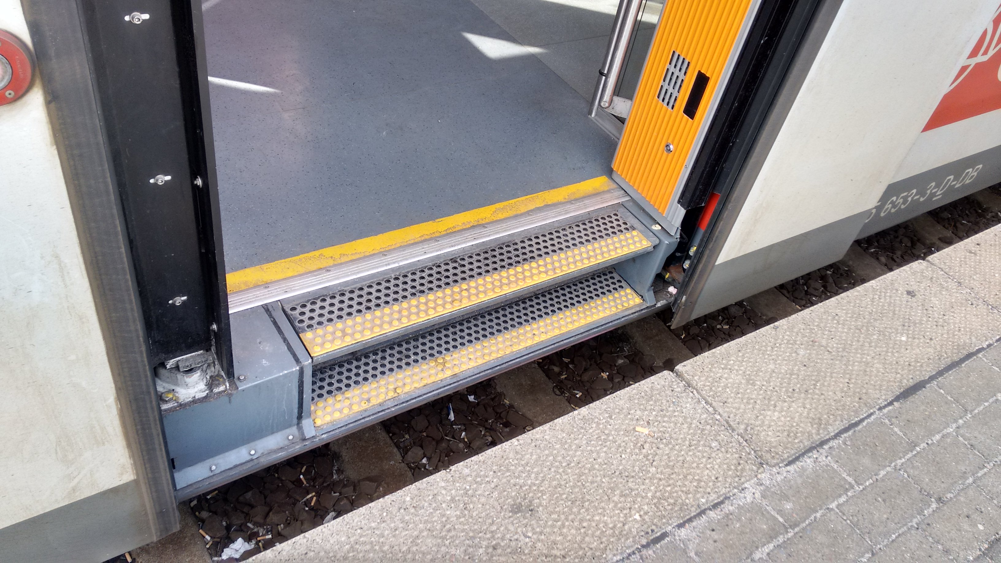 Klapptrittstufe im Zug 425 653 der S-Bahn Hannover. Die orangefarbenen Markierungen neben den Türen weisen auf den nicht barrierefreien Ausstieg und die fehlende Spaltüberbrückung hin.